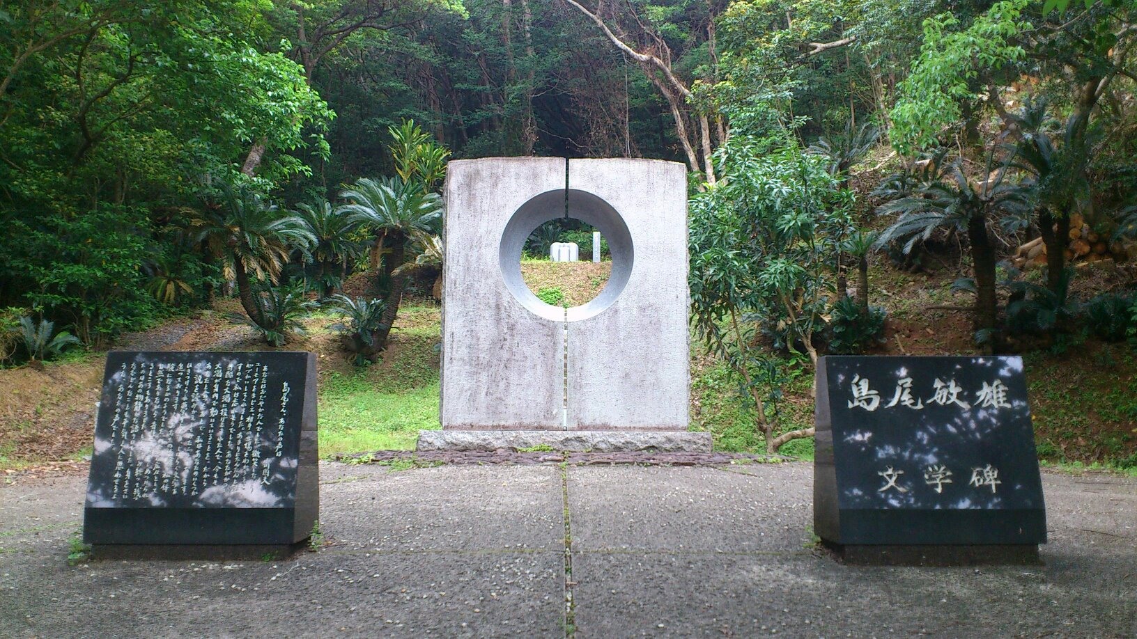 鹿児島県大島郡瀬戸内町呑之浦にある島尾敏雄文学記念碑